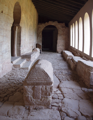 Portaleyo de Gonzalo de Berceo y sepulturas del siglo X